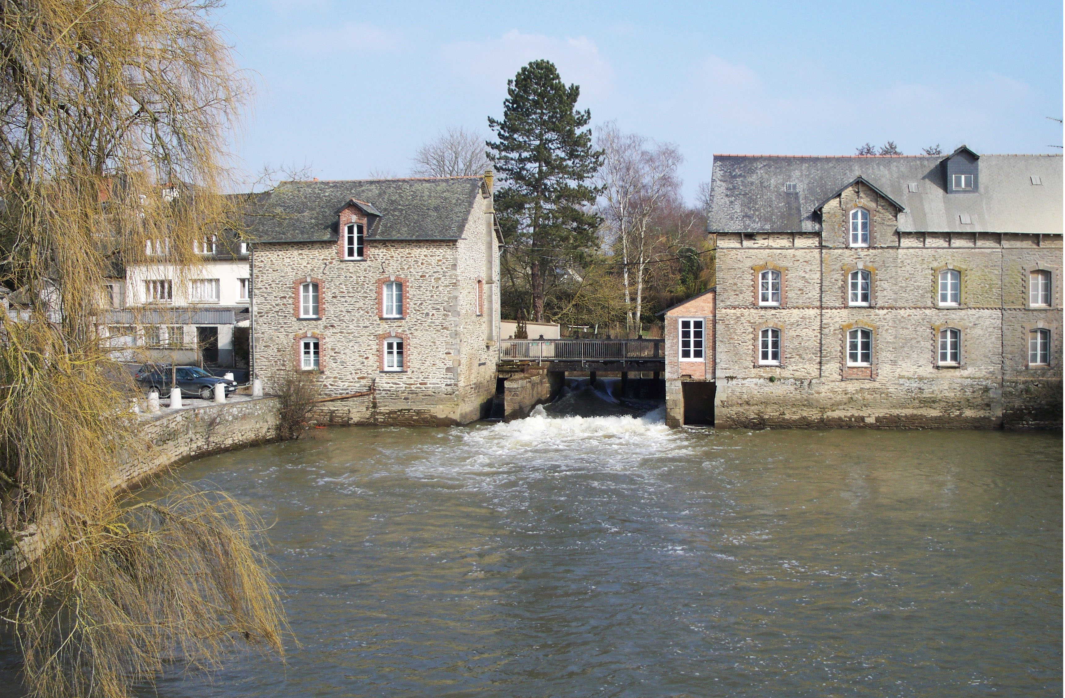 Le Moulin d'Acigné, entre Noyal-sur-Vilaine et Acigné.